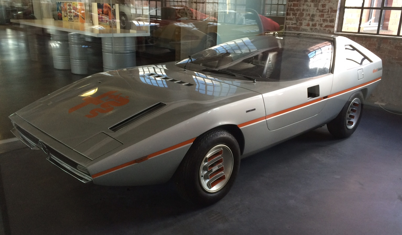 Alfa Caimano in der Klassikstadt